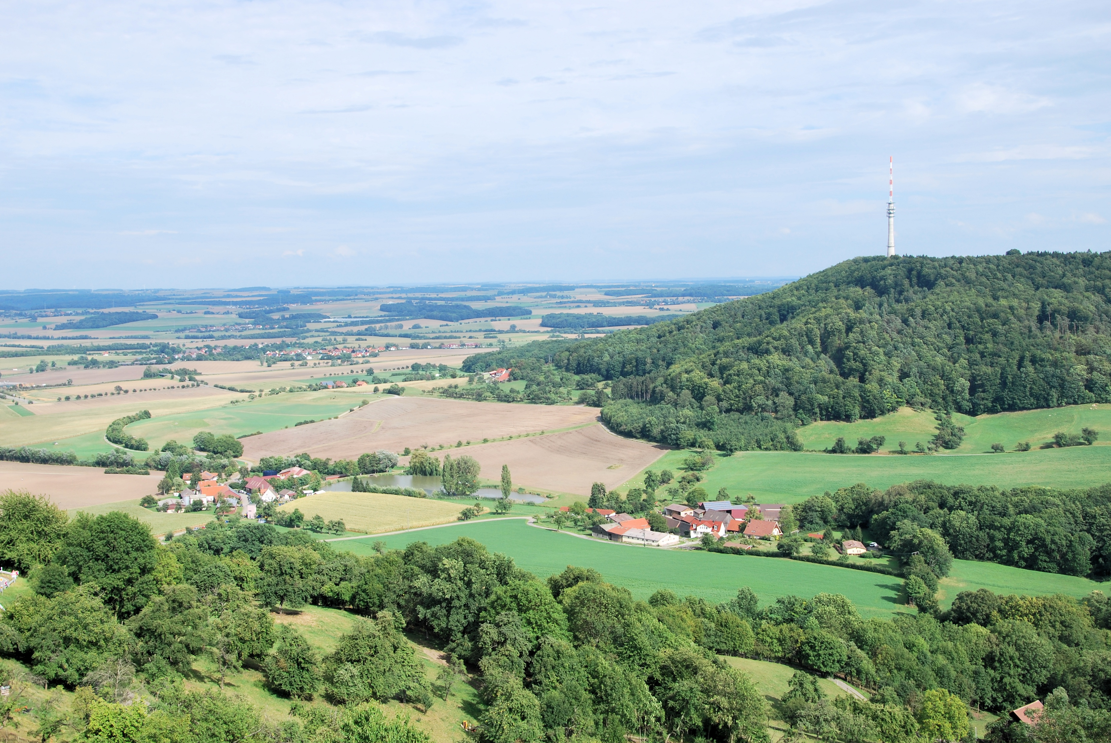 Blick vom Waldenburger Lachnersturm (Hochwächterturm) in Richtung Osten auf die Hohenloher Ebene und den Sendeturm Waldenburg-Friedrichsberg. In der Mulde davor fließt der Epbach in seinem obersten Tal an der Ober- und Untermühle des Städtchens vorbei.